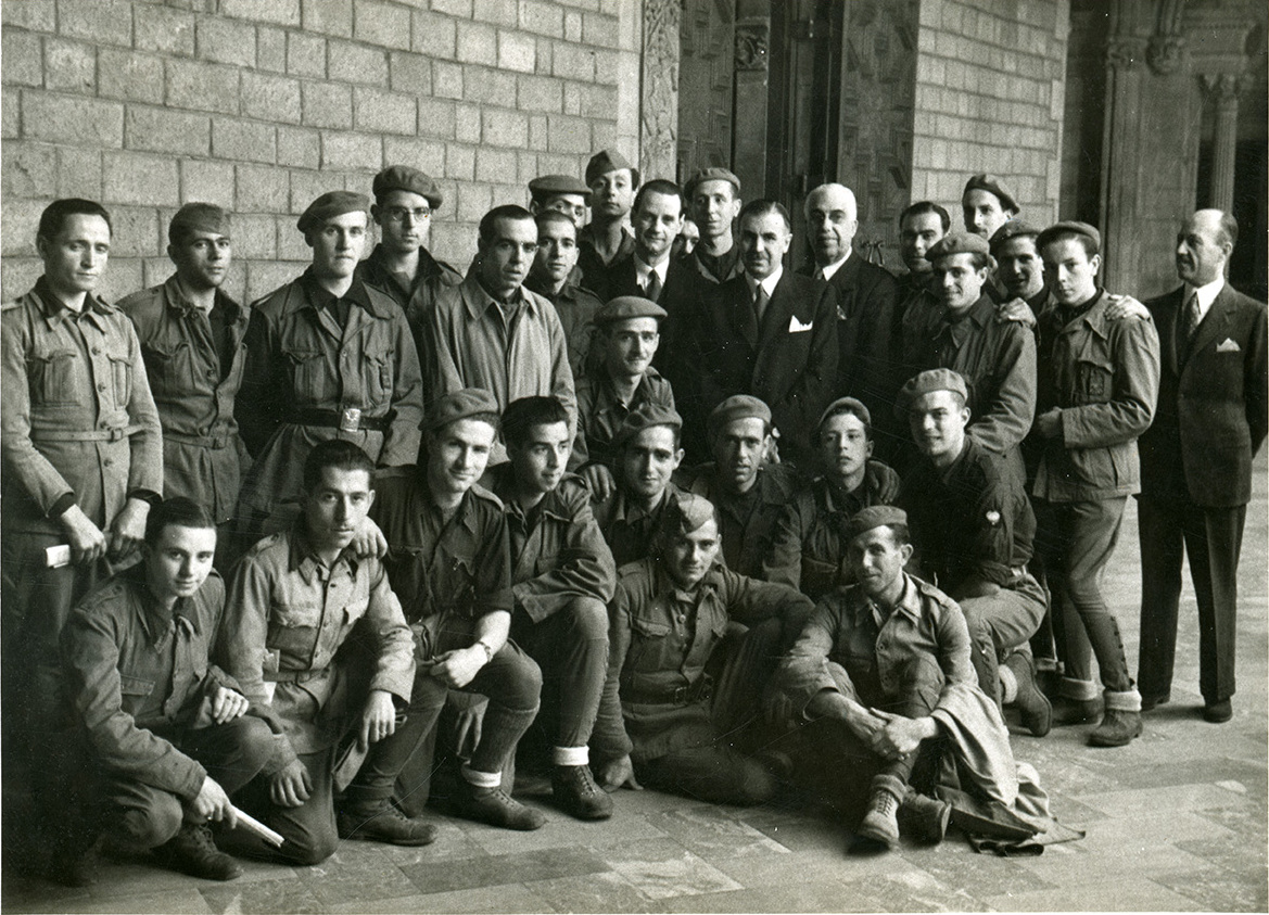 El alcalde Miguel Mateu con voluntarios de la División Azul (1942).